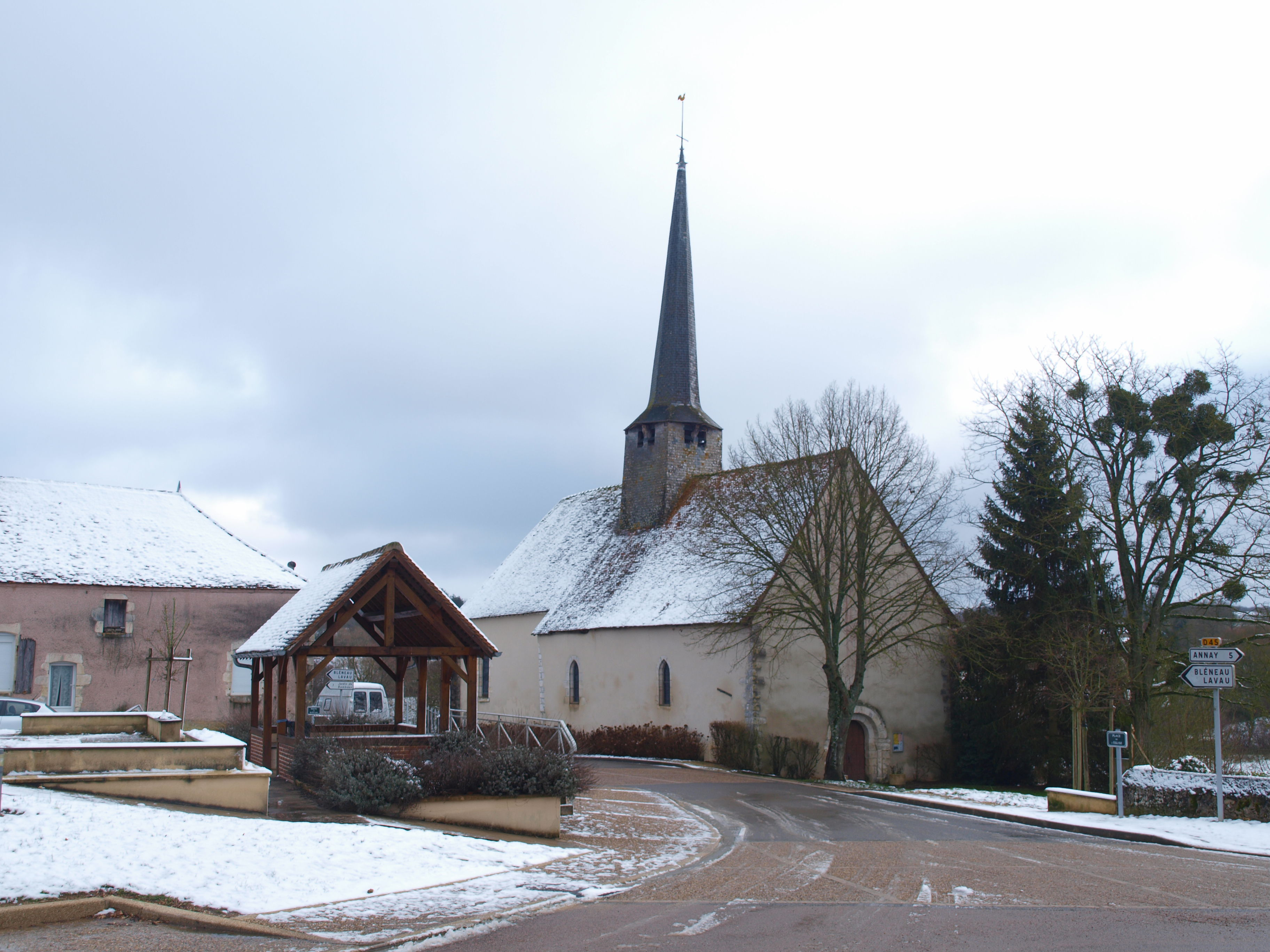 Faverelles (Loiret, France) , l'église l'hiver.